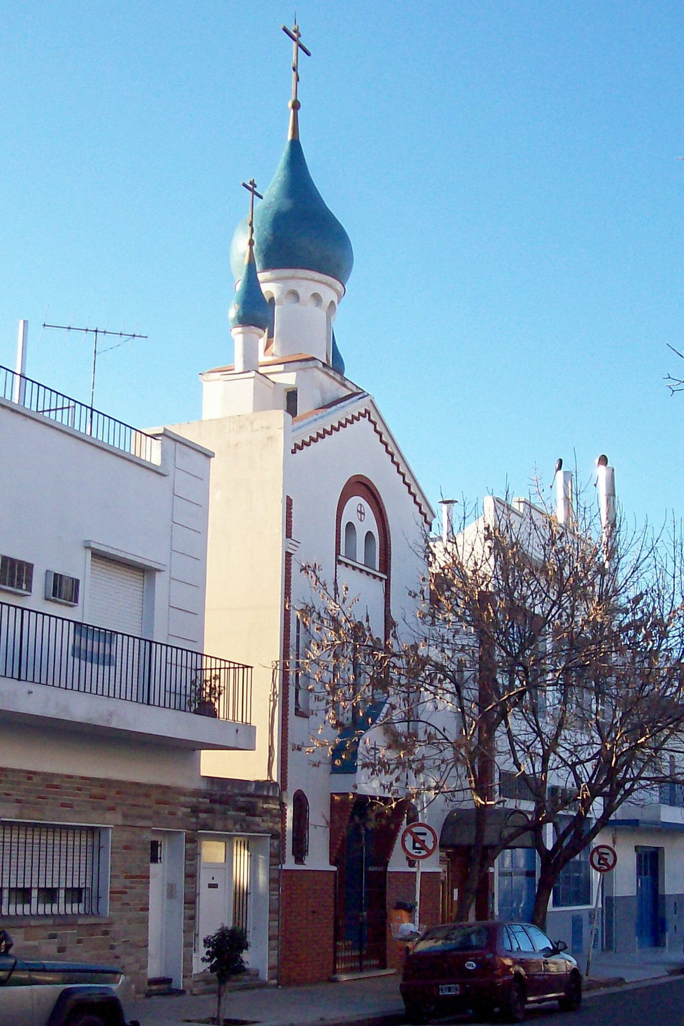 Catedral Ortodoxa Rusa de la Resurrección, Buenos Aires -Dirección, Nuñez 3541, barrio de Saavedra, Buenos Aires, Argentina